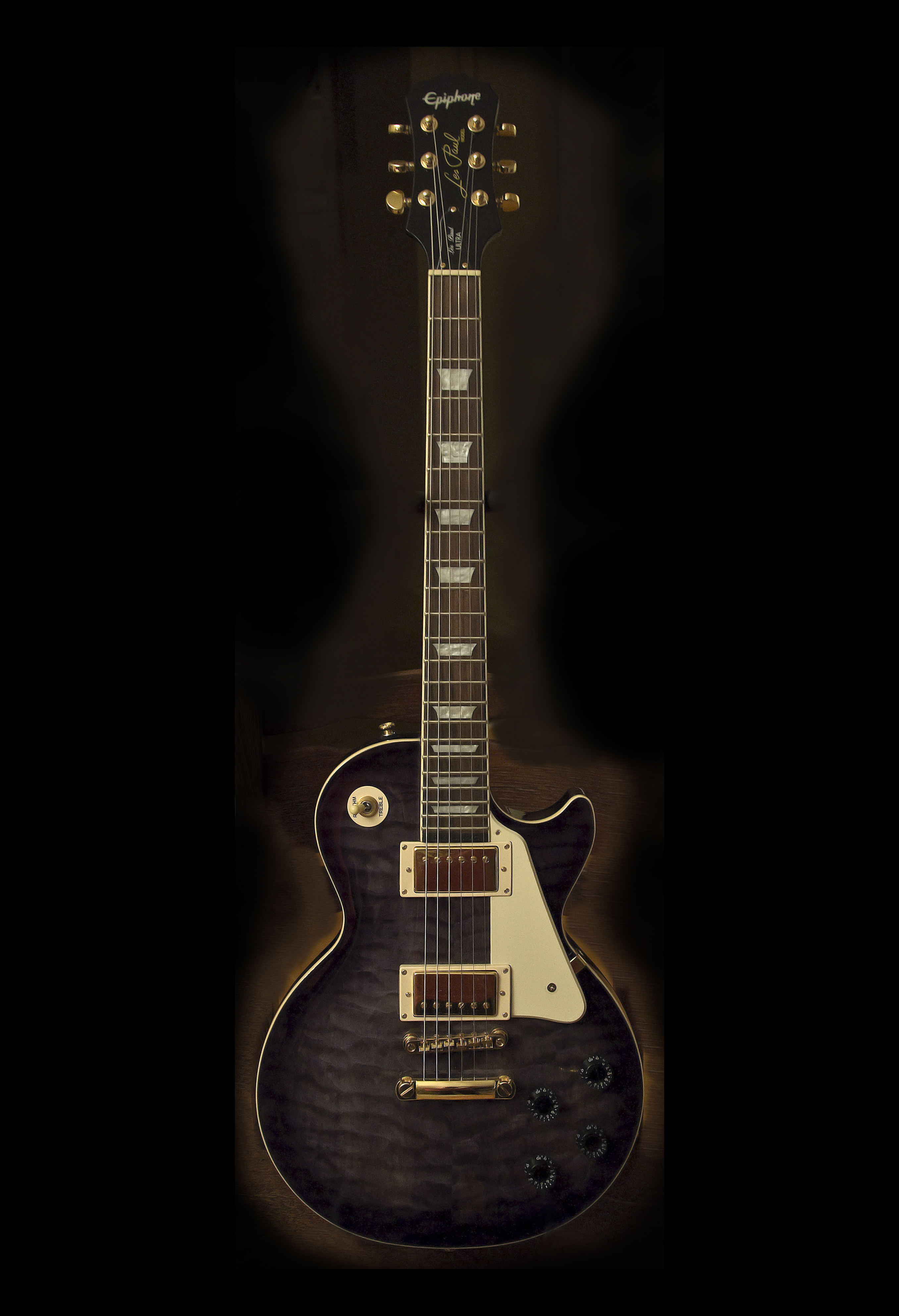 Mijn Epiphone Les Paul Ultra II